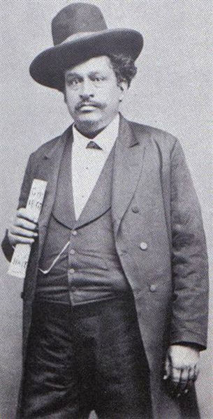 Portrait du président Pierre Théoma Boisrond-Canal